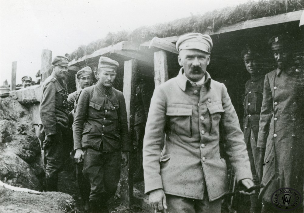 Komendant Józef Piłsudski w okopach 4 pułku piechoty Legionów Polskich pod Rudką Miryńską. Trzeci od lewej mjr Albin Fleszar, ps. Satyr